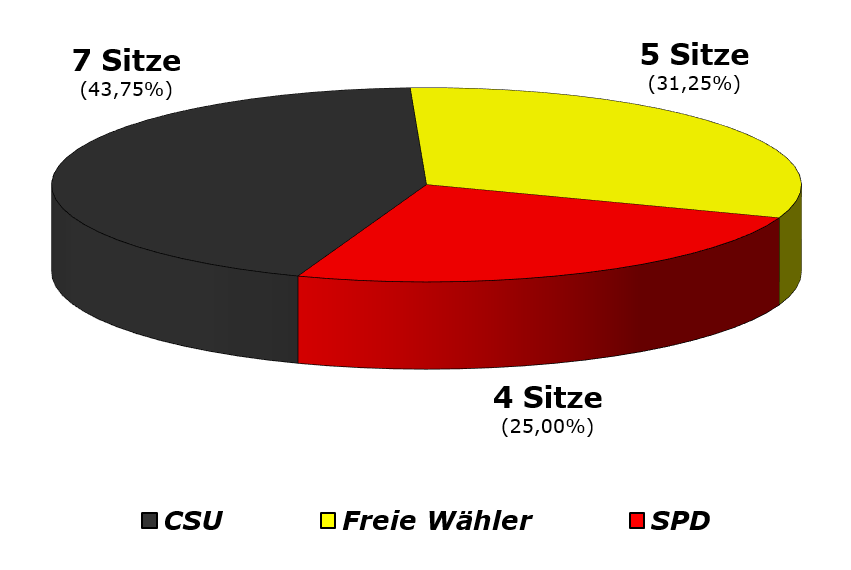 Grafik zur Sitzverteilung im Gemeinderat Niedernberg nach Wahl im Jahr 2020